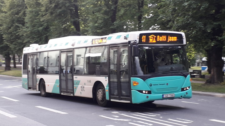 41 Bussiliin Kaarli pst